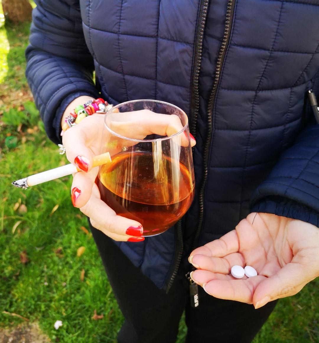 Addiction aux substances